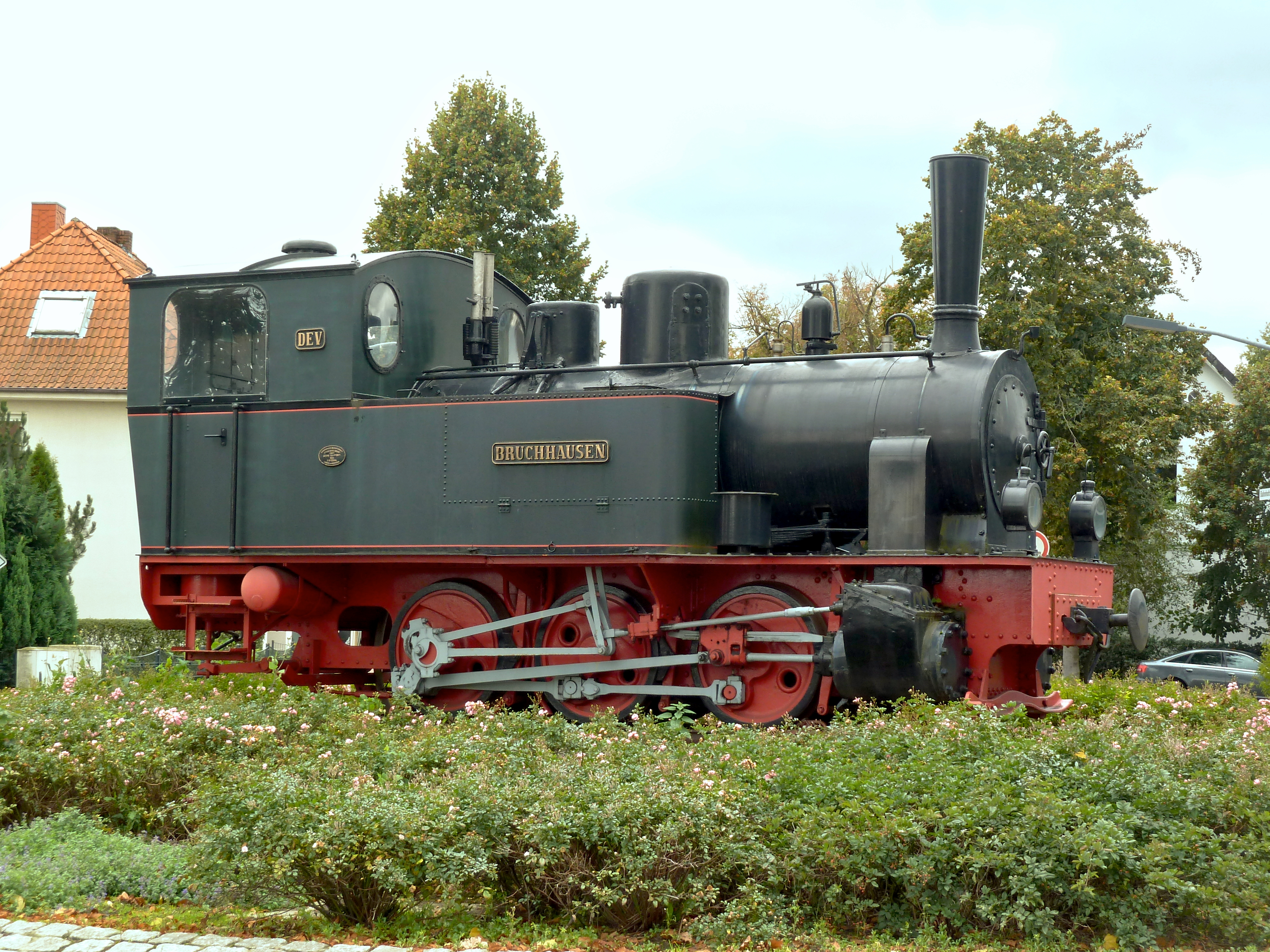 Dampflokomotive „Bruchhausen“ (C n2t Hanomag 3344/1899) als Denkmal in Bruchhausen-Vilsen 16.Oktober 2010